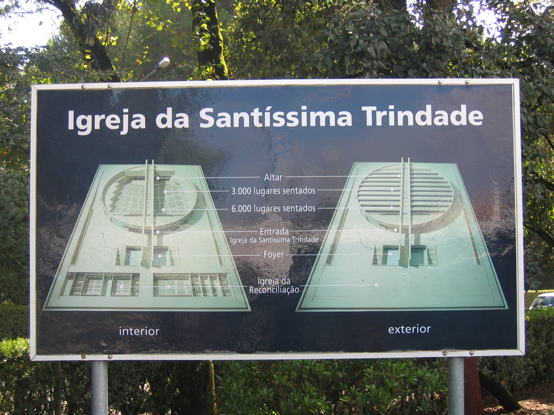 Tafel neben der Igreja da Santissima Trindade